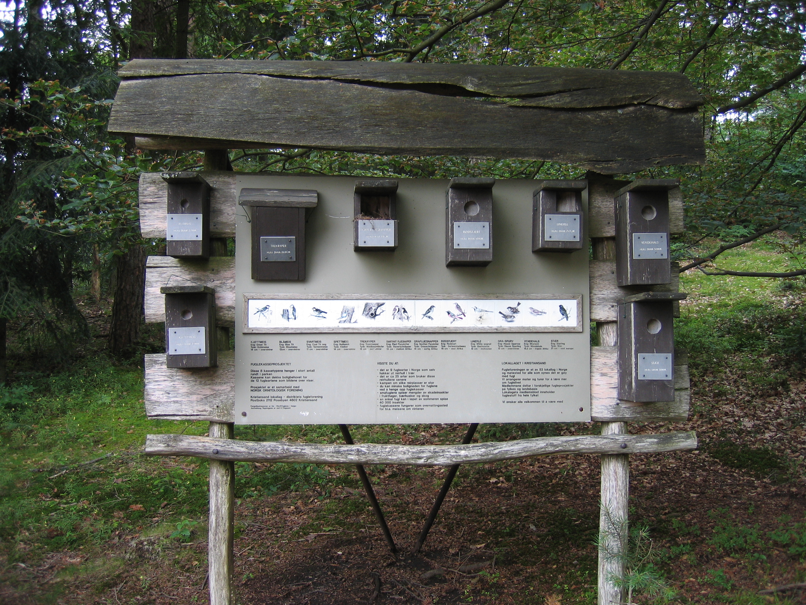 Birshouses, fuglekasser på Gimle gård, Kristiansand, Norge